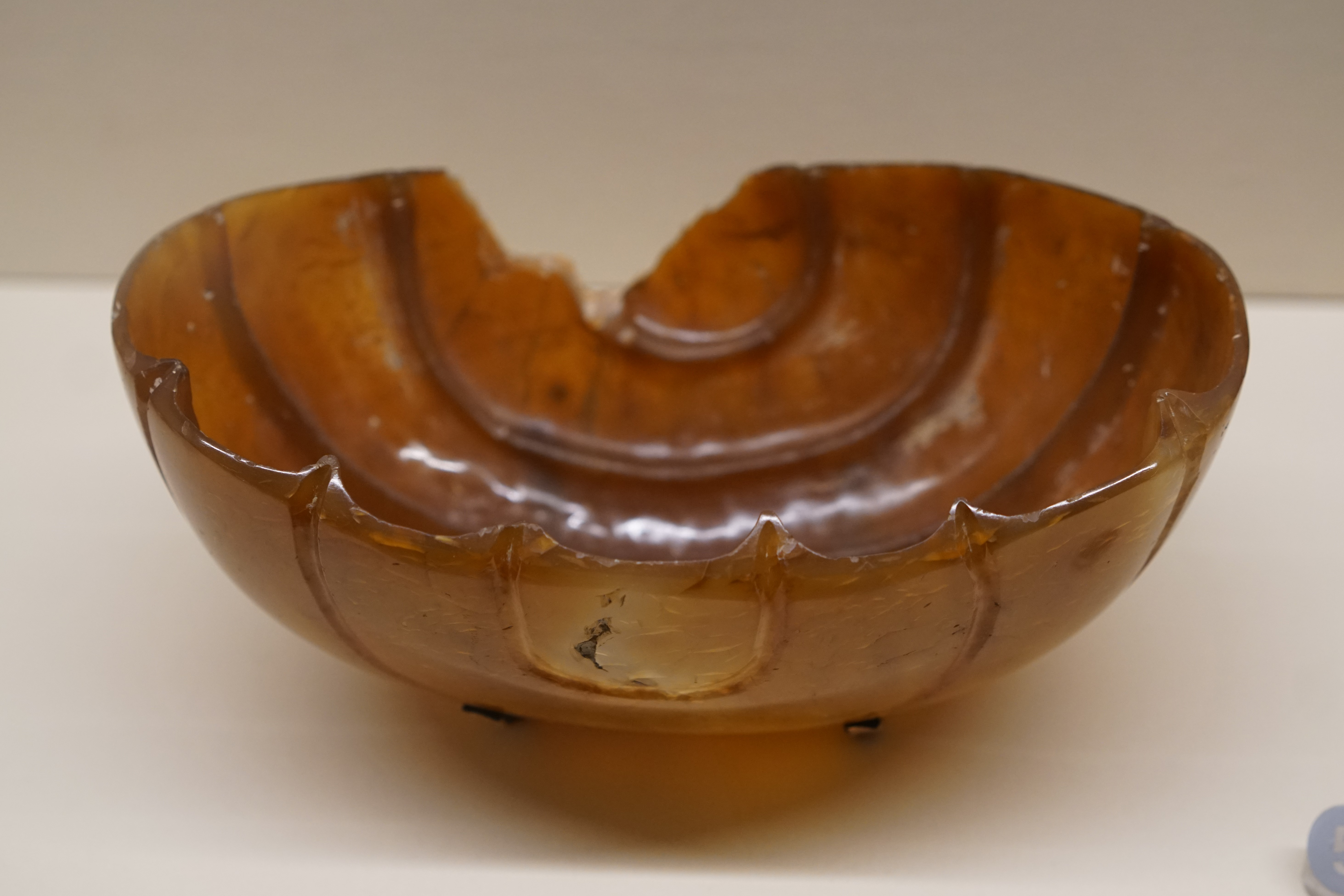 中文（中国大陆）: 青海3.15盗掘古墓葬古文化遗产案追缴。一级文物。唐·吐蕃。整块黄玛瑙制成。寰底，有12个曲瓣，杯内有突棱。萨珊式多曲长杯，北魏时传入中国，并对唐代金银器制作产生影响。